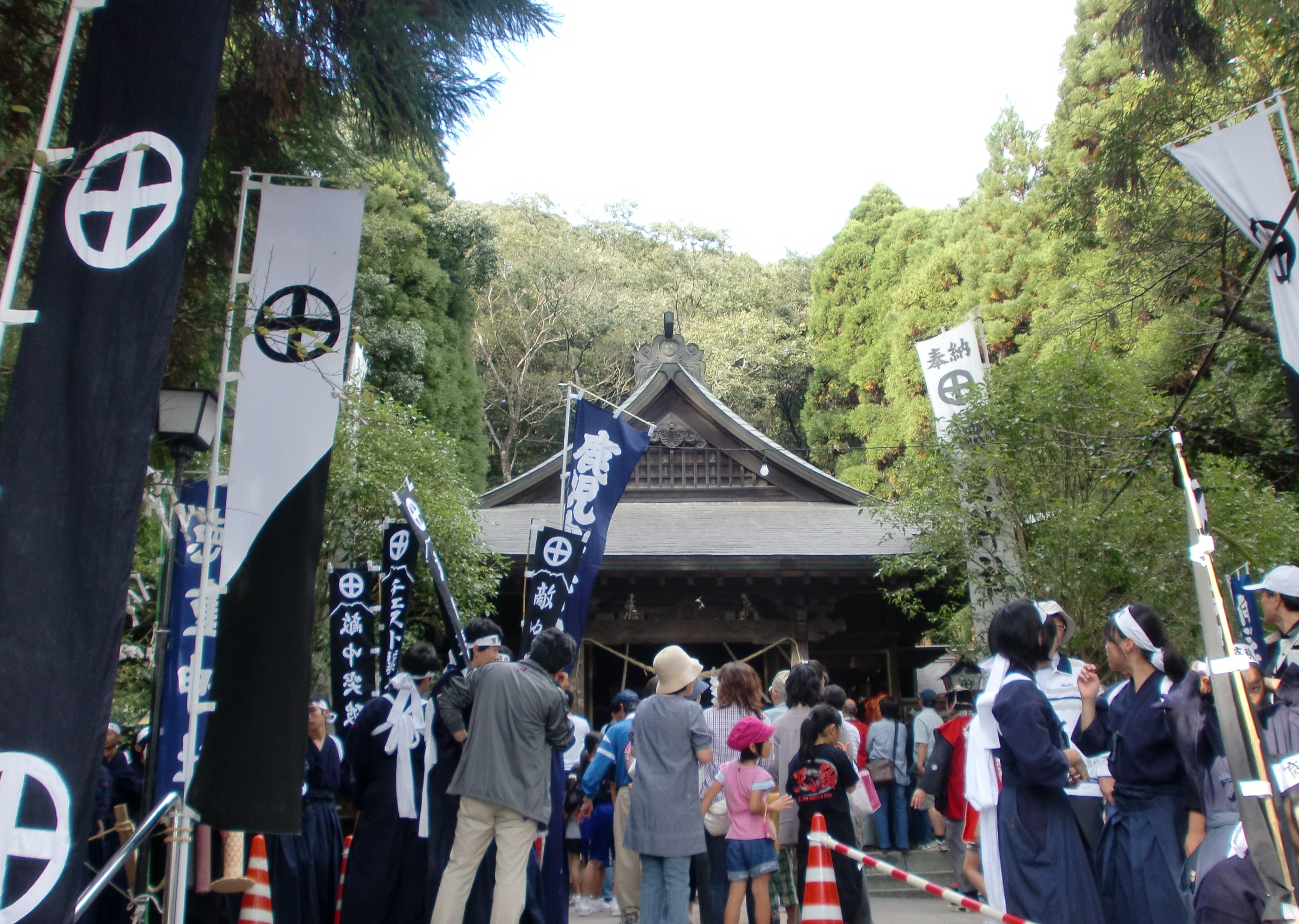 妙円寺詣りで賑わう徳重神社。（一部トリミング済み）